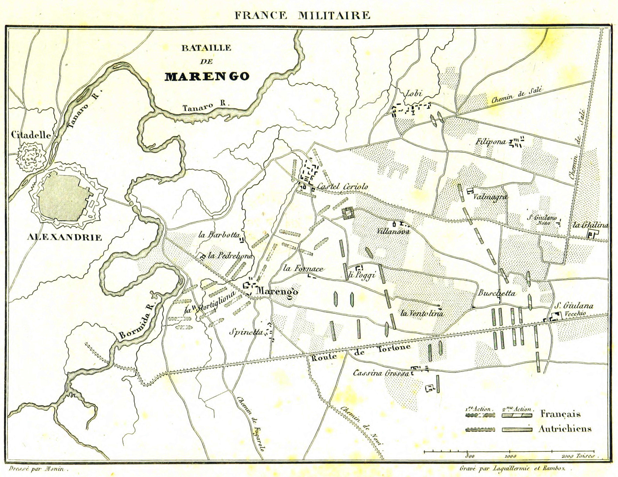 Mappa descrittiva della Battaglia di Marengo